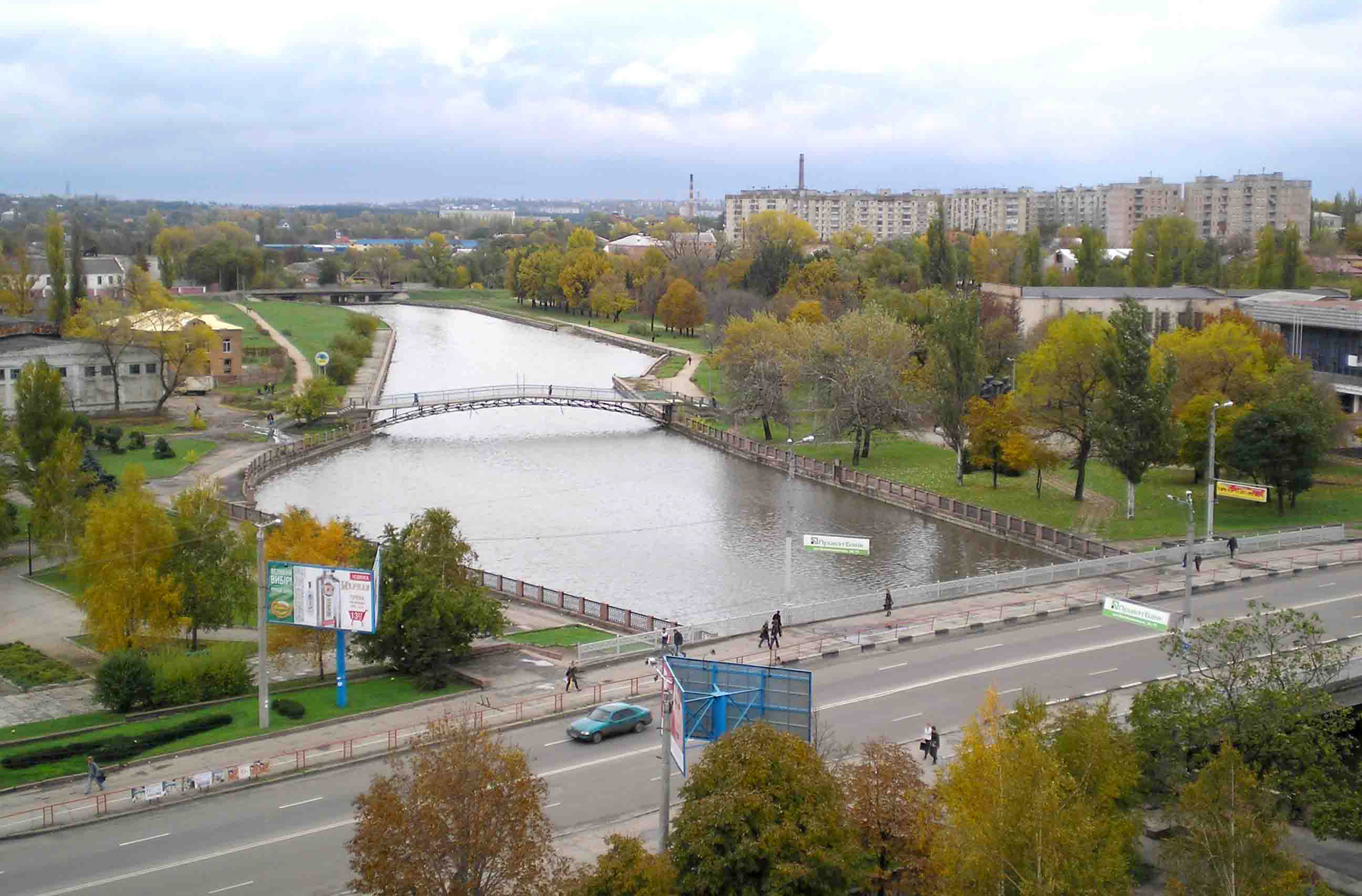 Кировоград. Набережная. Осень